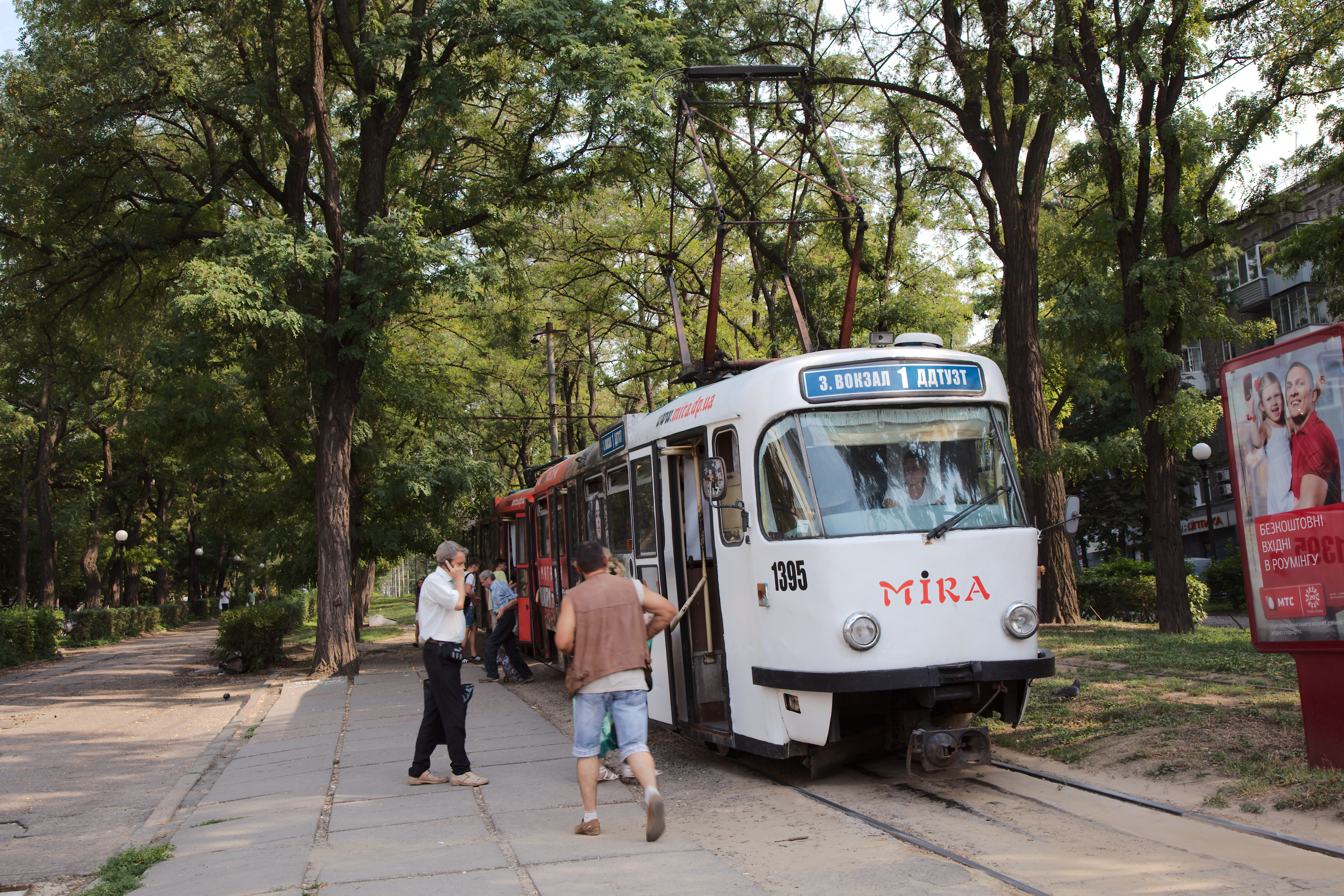 Dnipropetrovsk